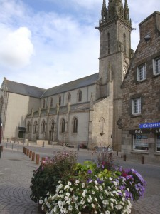 Eglise de style néo-gothique datant du XIXe siècle (construite en 1863-1864).